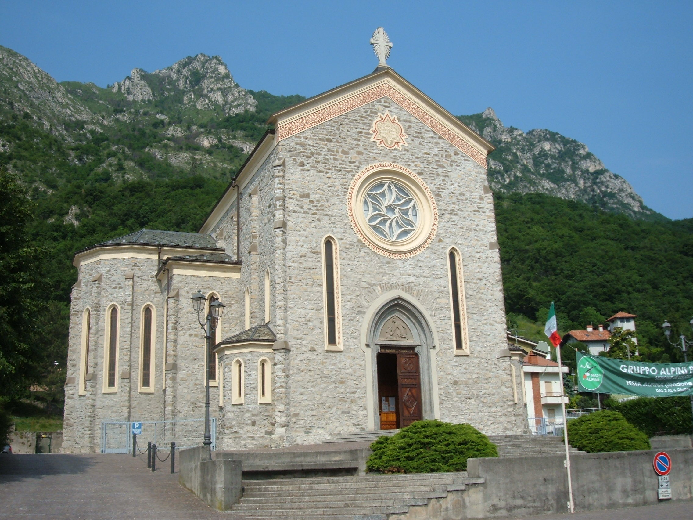 Chiesa parrocchiale di Pescate (prov. di Lecco), dedicata al Divin Salvatore e a Santa Teresa del Bambin Gesù.